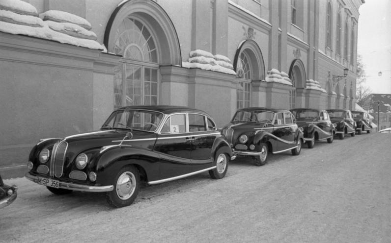 Staatsbesuch Zypern. Vizepräs. Kütchük [Kütschük]